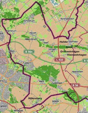 Karte der Gemeinde Selfkant